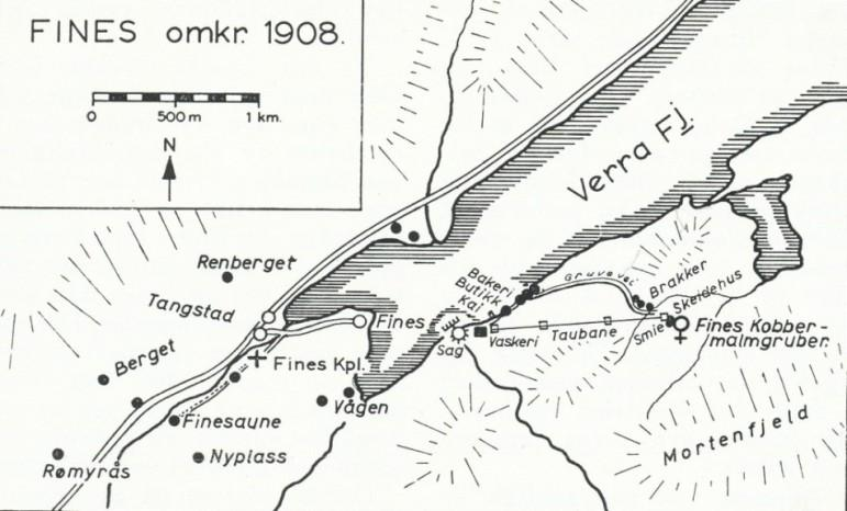 Kart over Fines Gruver